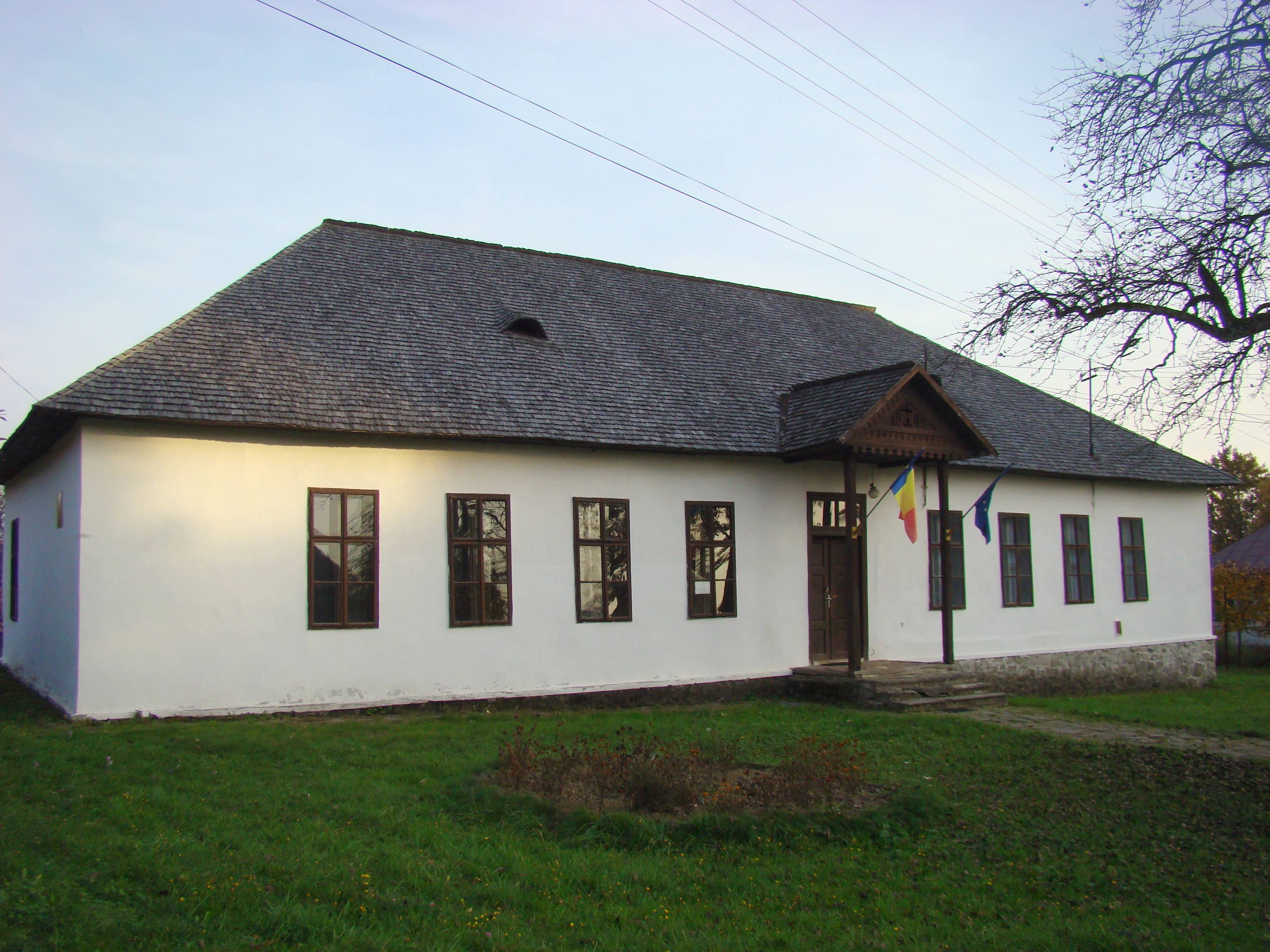 Școala Vasile Lucaciu din Șișești